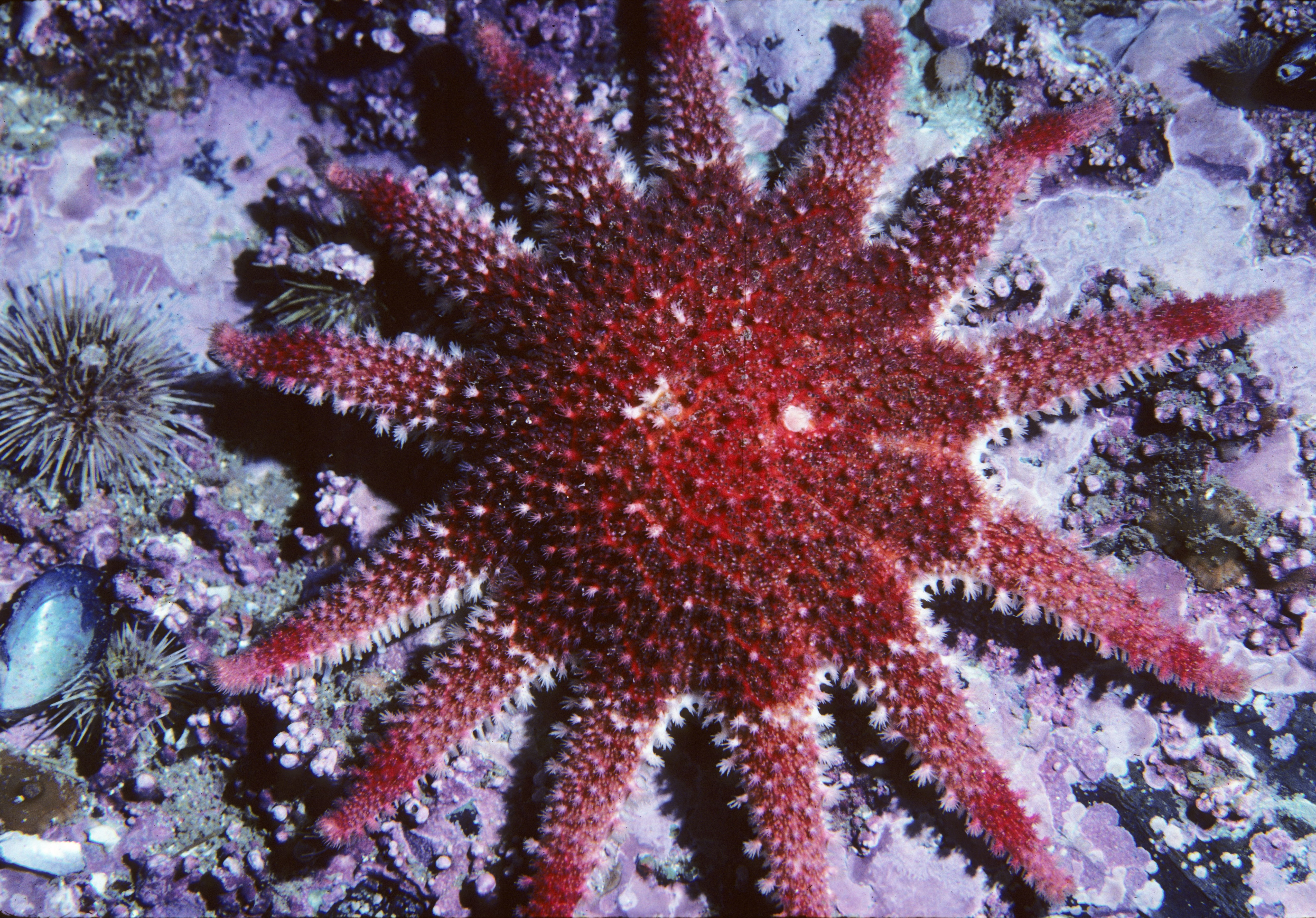 Sun star, Crossaster papposus